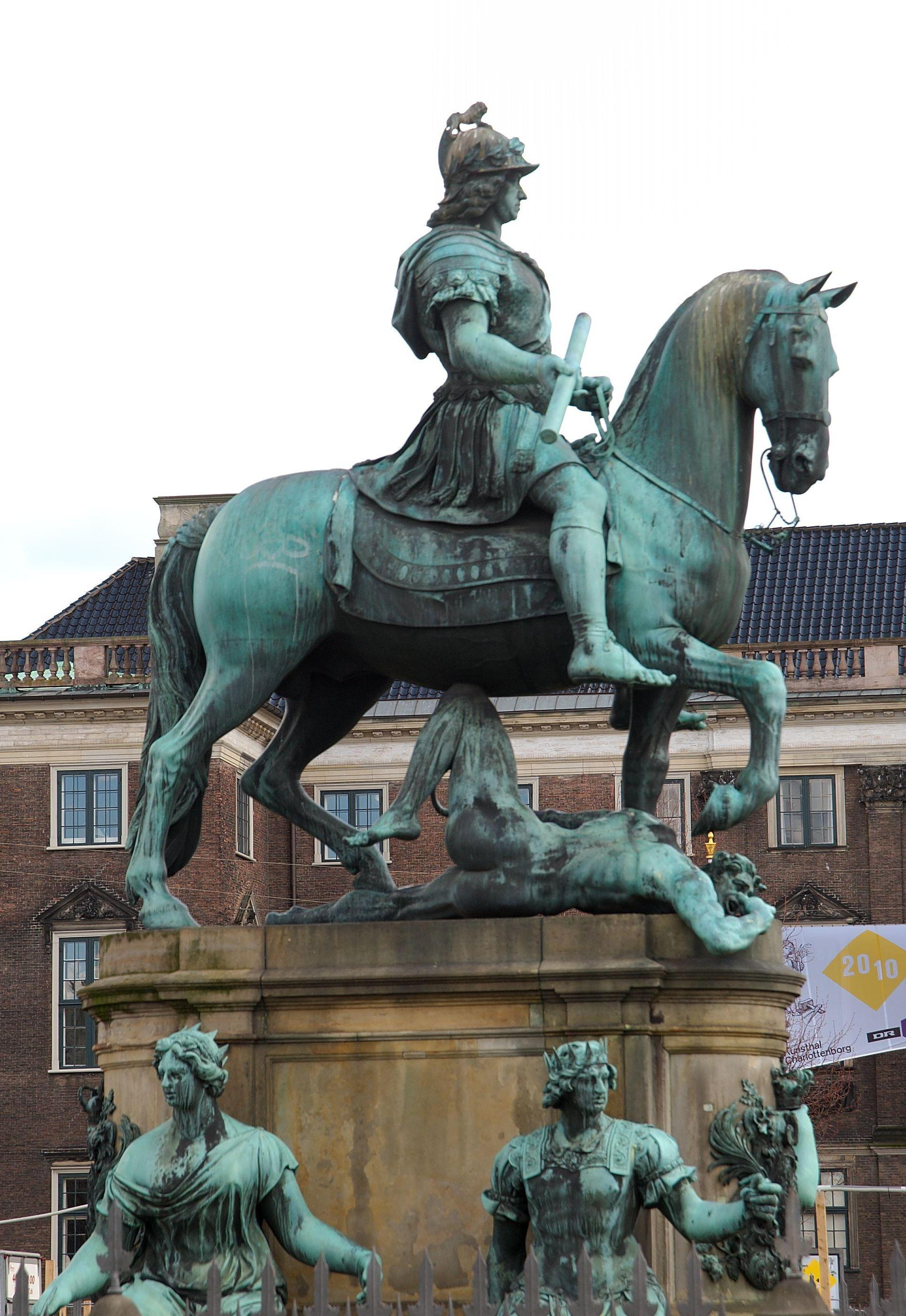 Kong Christian Vs statue fra 1688 på Kongens Nytorv. Kunstner: den franske billedhuggeren Abraham-César Lamoureux